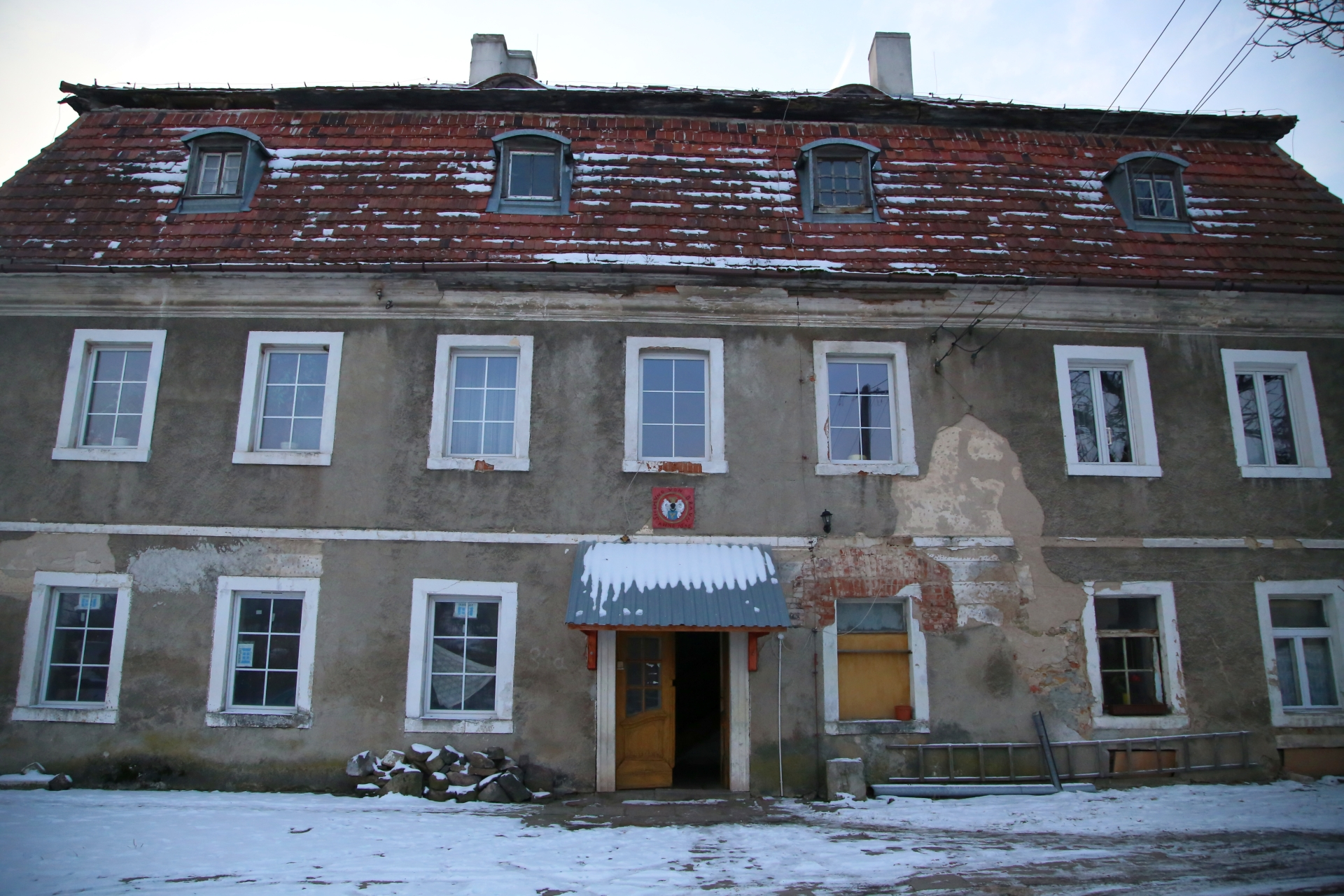 Dom rodziny von Braun w Bystrzycy